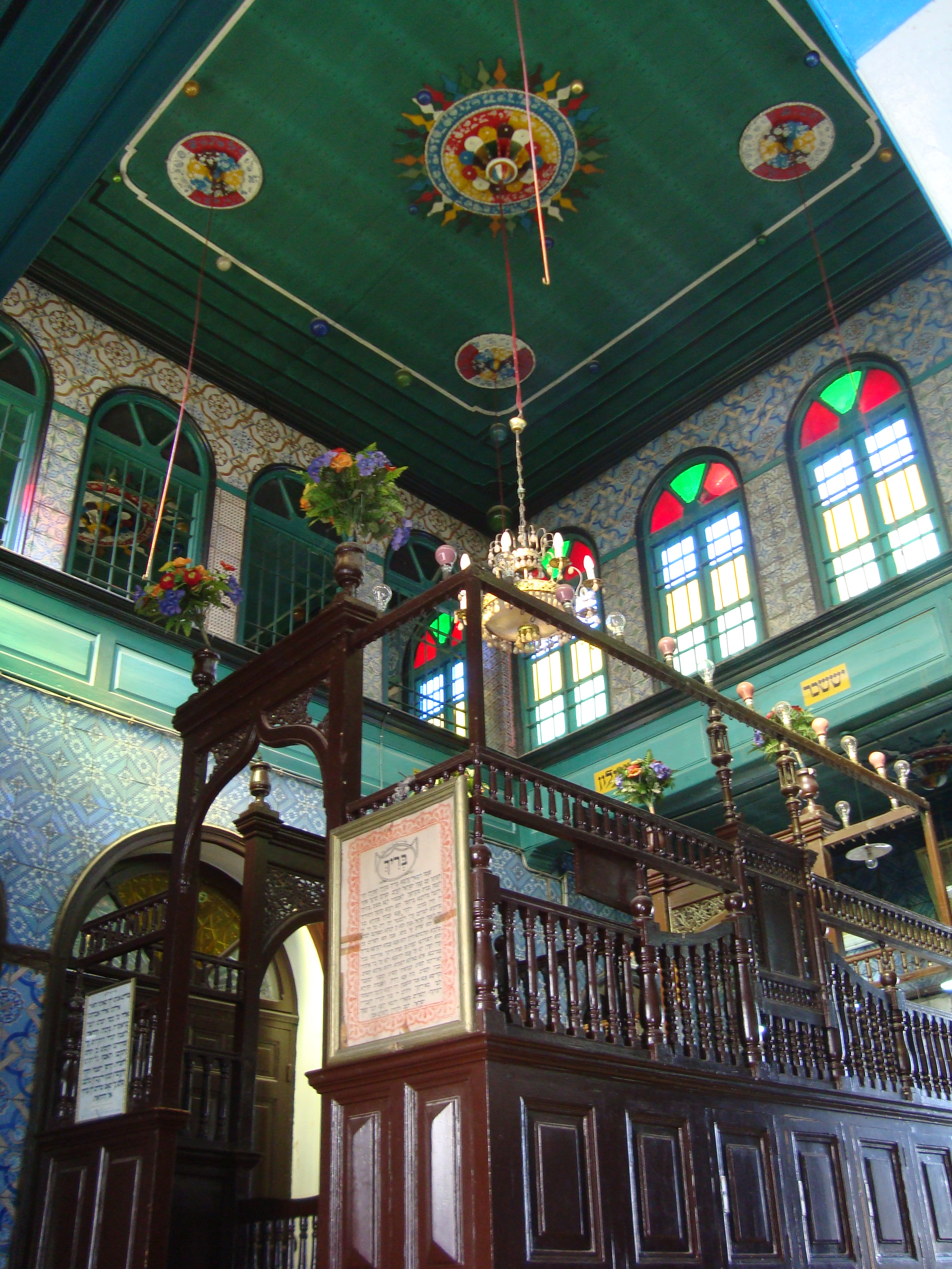 Vue intérieure de la synagogue de la Ghriba sur l'île de Djerba.